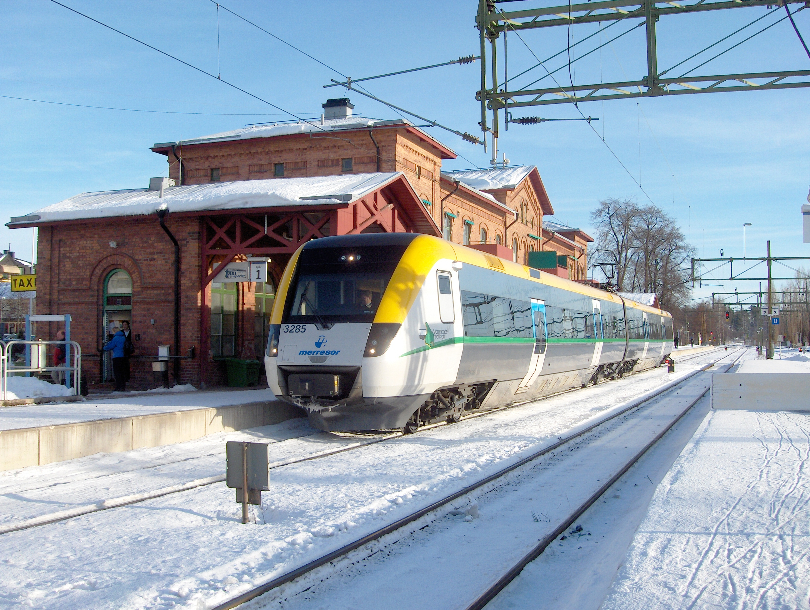 Bahnhof Arvika; Länståg nach Charlottenberg